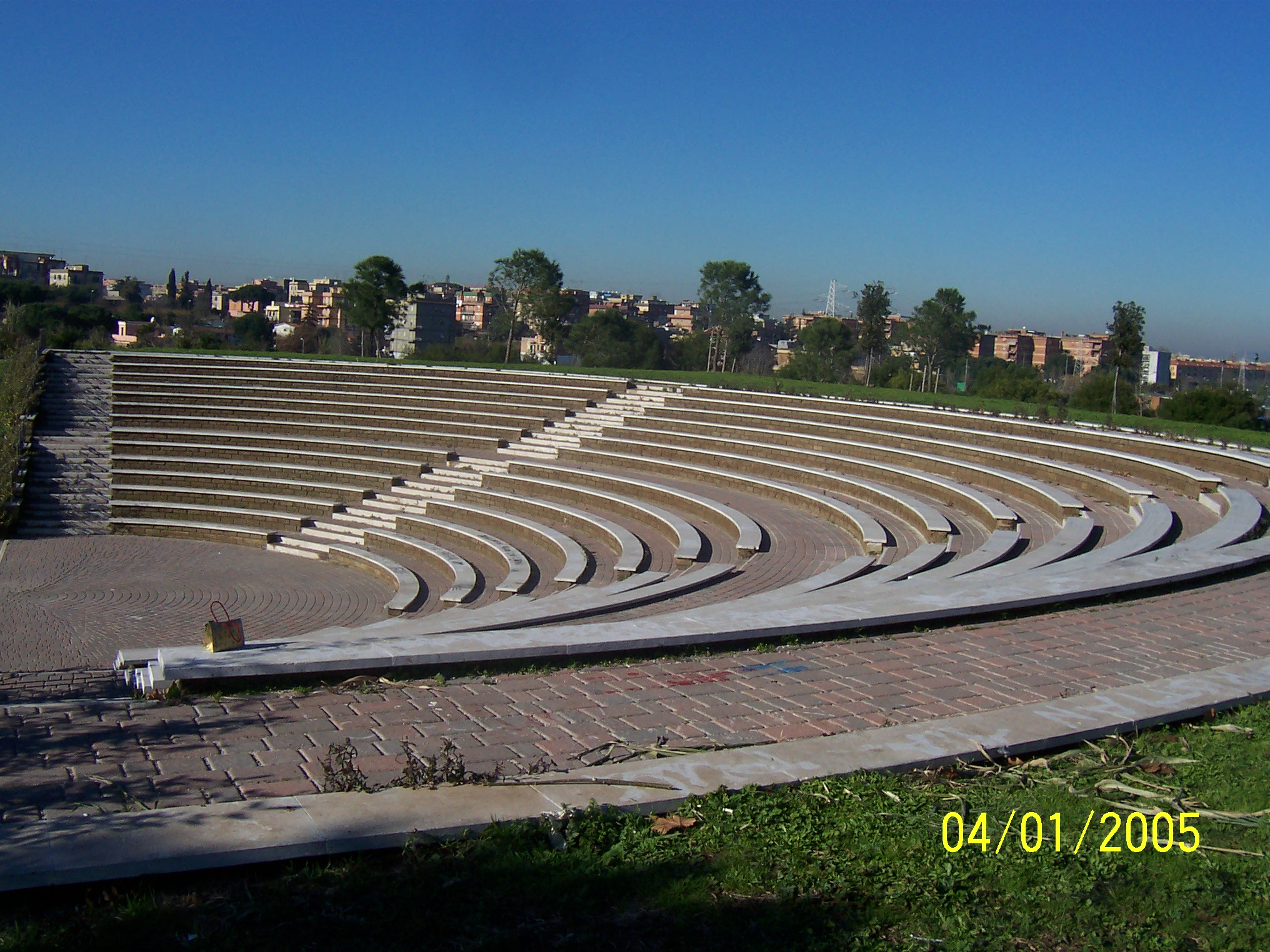 Anfiteatro_di_Tor_treteste